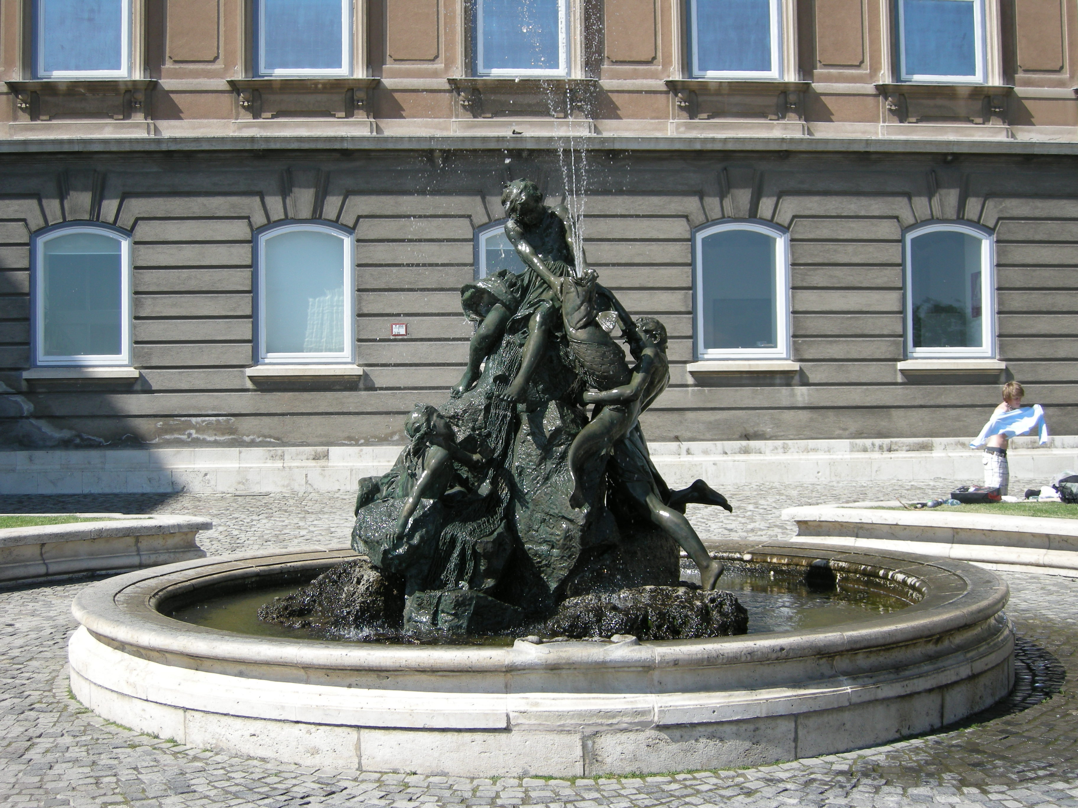 Budapest